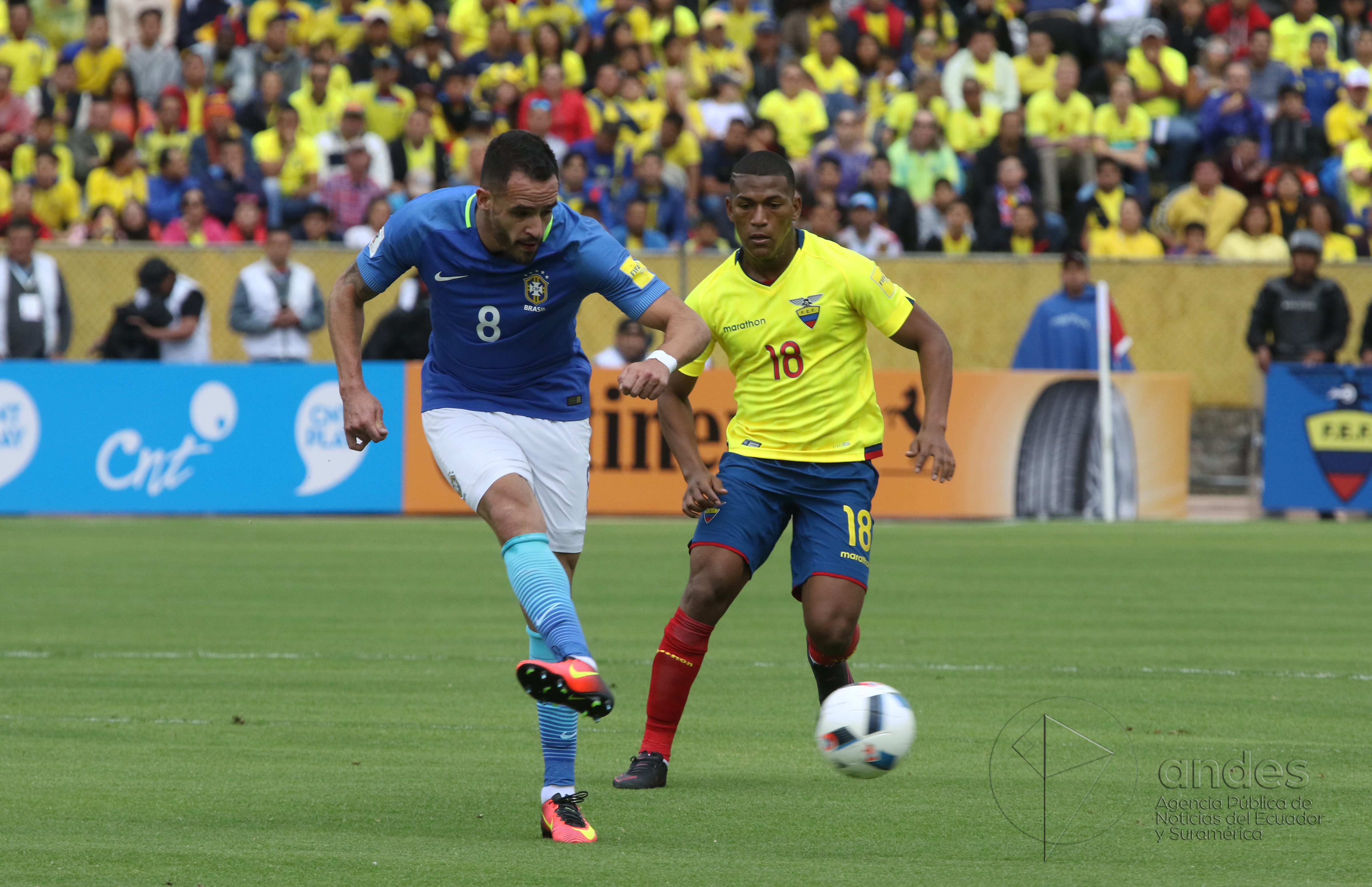 Quito, 01 sep (Andes).- La selección de Brasil se impuso la tarde de este jueves 3-0 ante Ecuador, en el estadio Olímpico Atahualpa, en el cotejo correspondiente a la fecha 7 de las Eliminatorias al Mundial de Rusia 2018. ANDES/Micaela Ayala V.